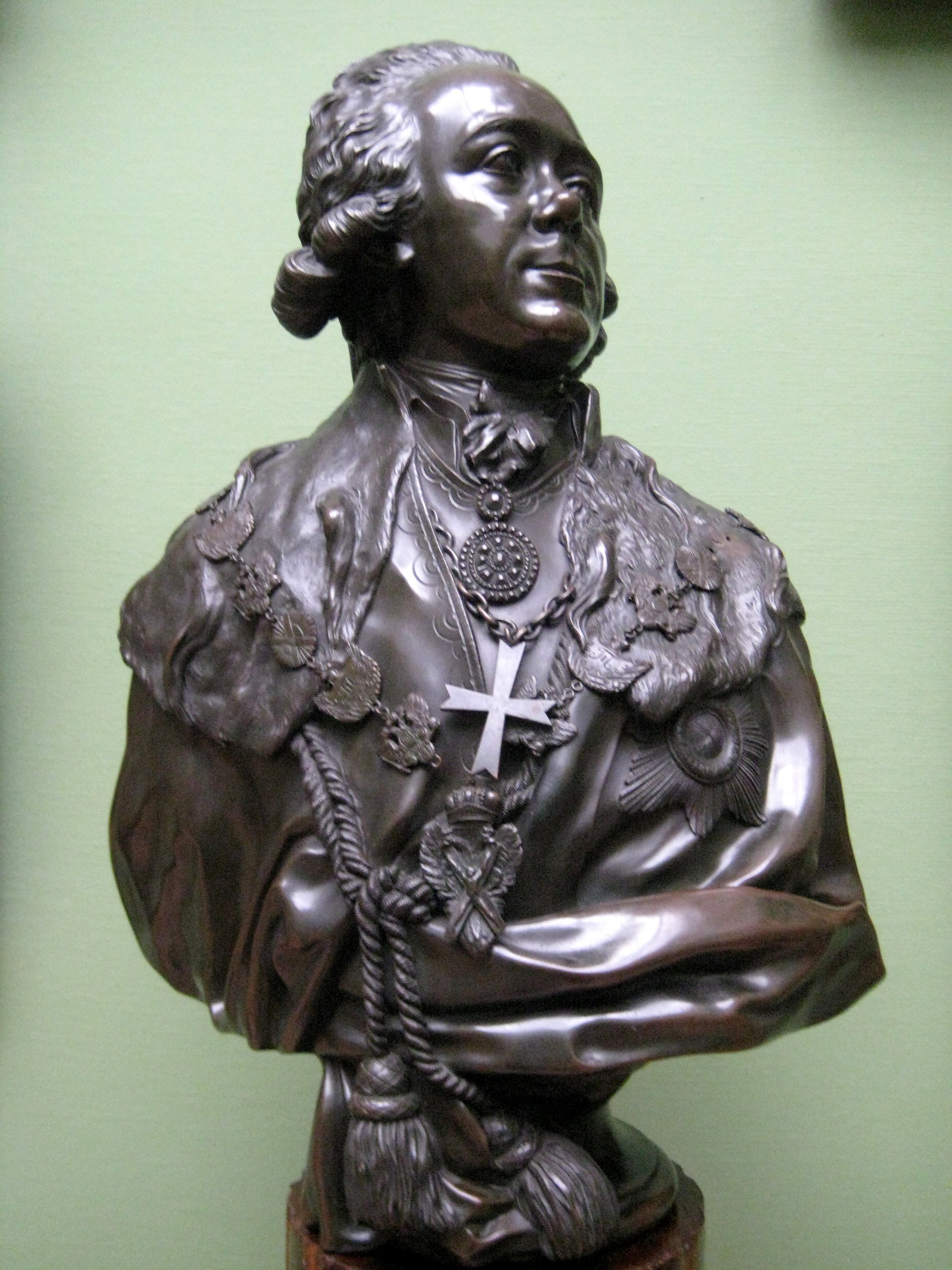 Бюст Павла I работы Ф. Шубина. Бронза. 1798, Третьяковская галерея